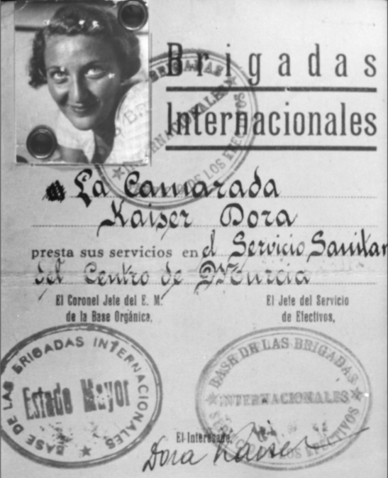 Identificació espanyola de les Brigades Internacionals de l'austríaca Dora-Haut Kaiser